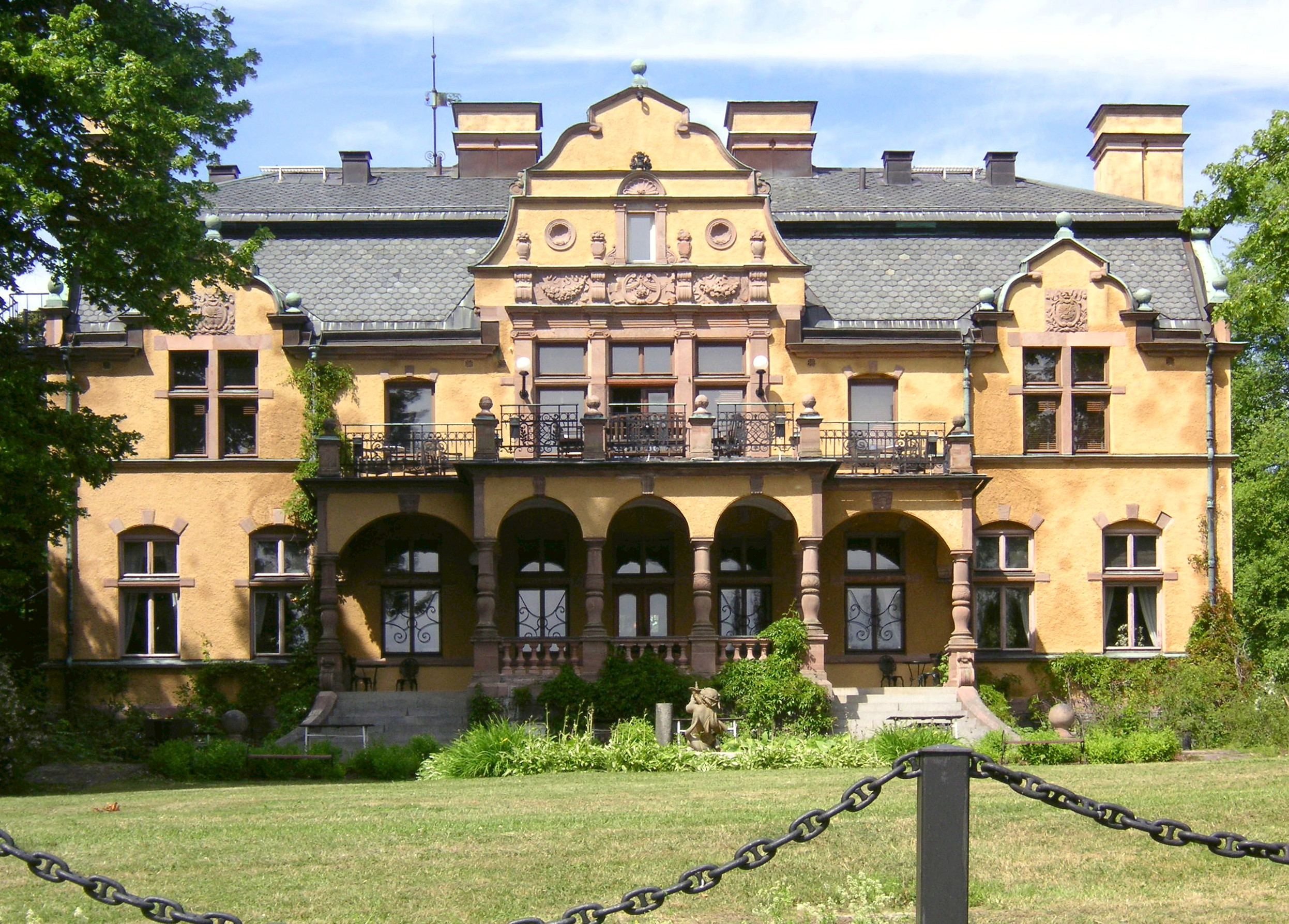 Ljunglöfska slottet i Blackeberg, Bromma, Stockholm, arkitekt Gustaf Lindgren